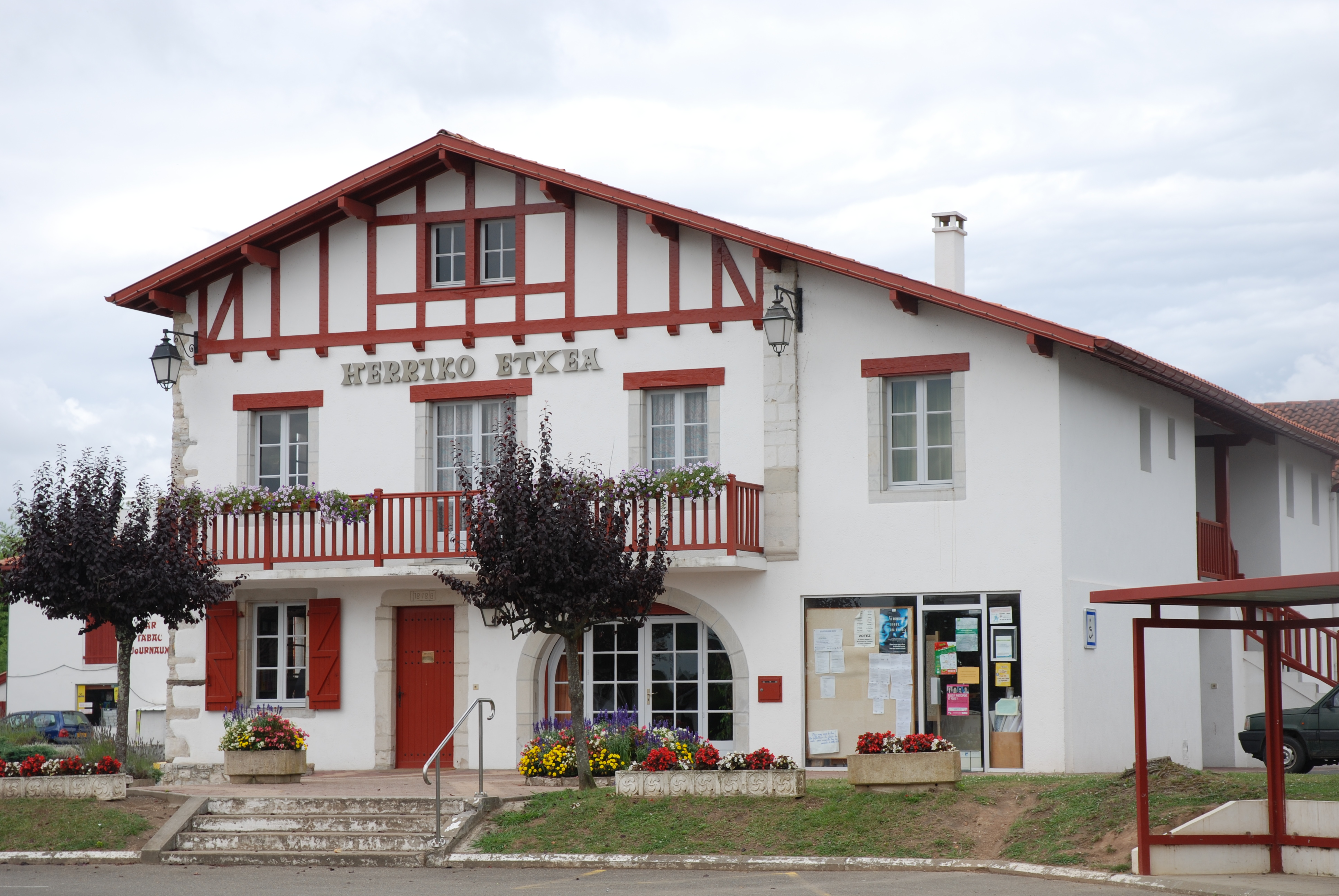 Urcuit, la mairie